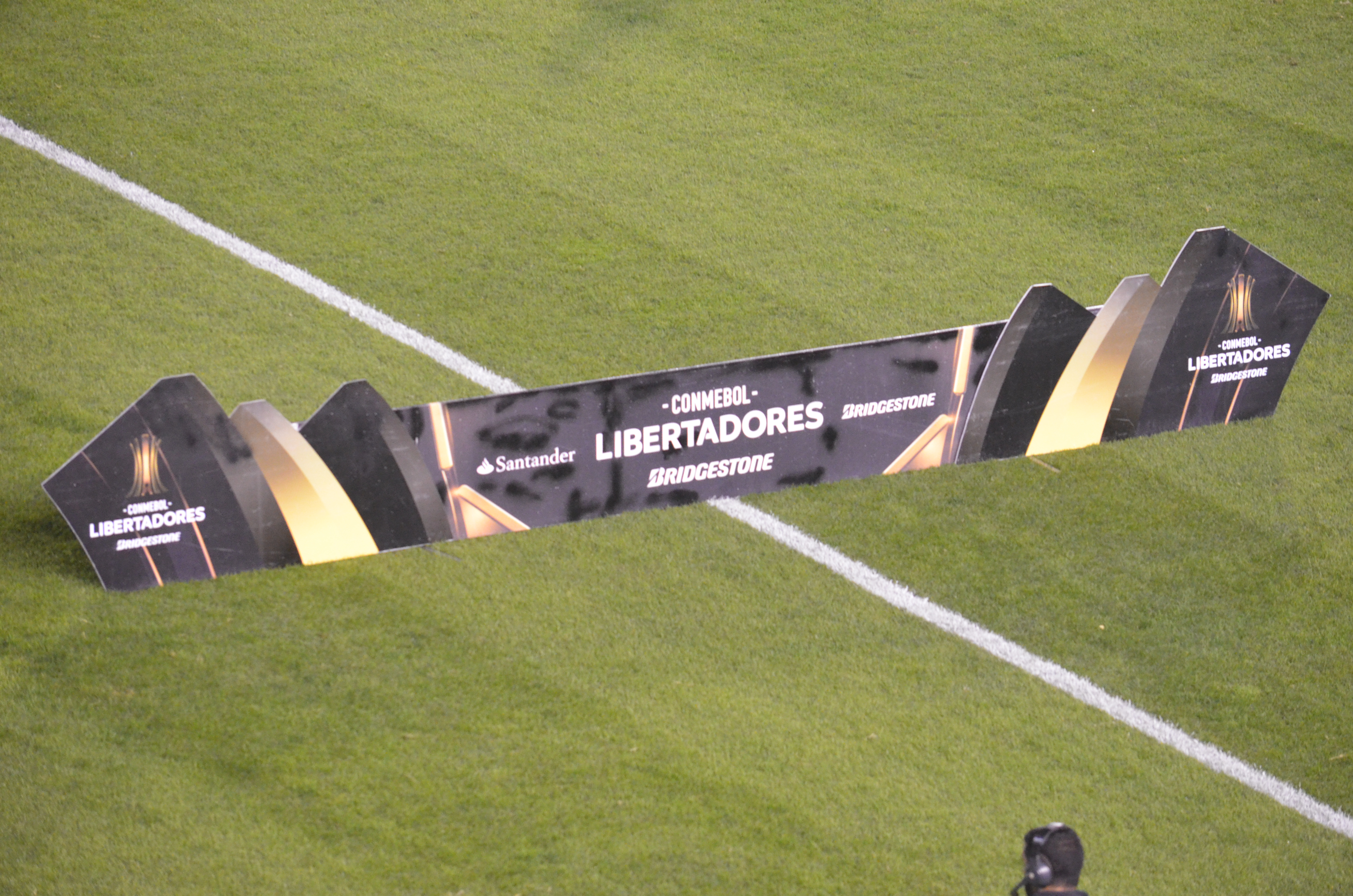 Imagen del partido disputado entre Nacional y Lanús, en el estadio Gran Parque Central, por la fase de grupos de la Copa Conmebol Libertadores 2016